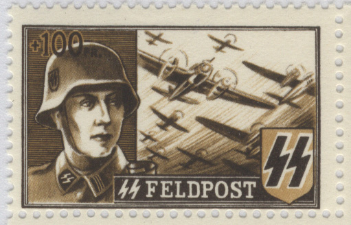 Stamp of the Waffen-SS Legion Vlaandern, 1945, Michel-Deutschland-Katalog 2005/2006 S. 341 Nr. XIX